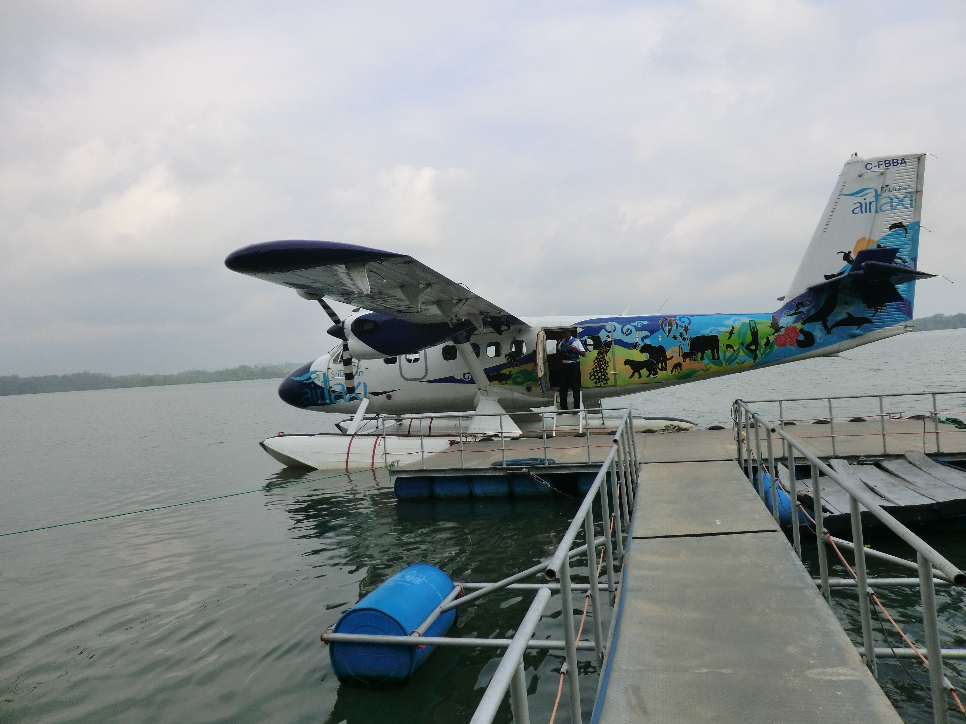 SriLankan Airlines AirTaxi